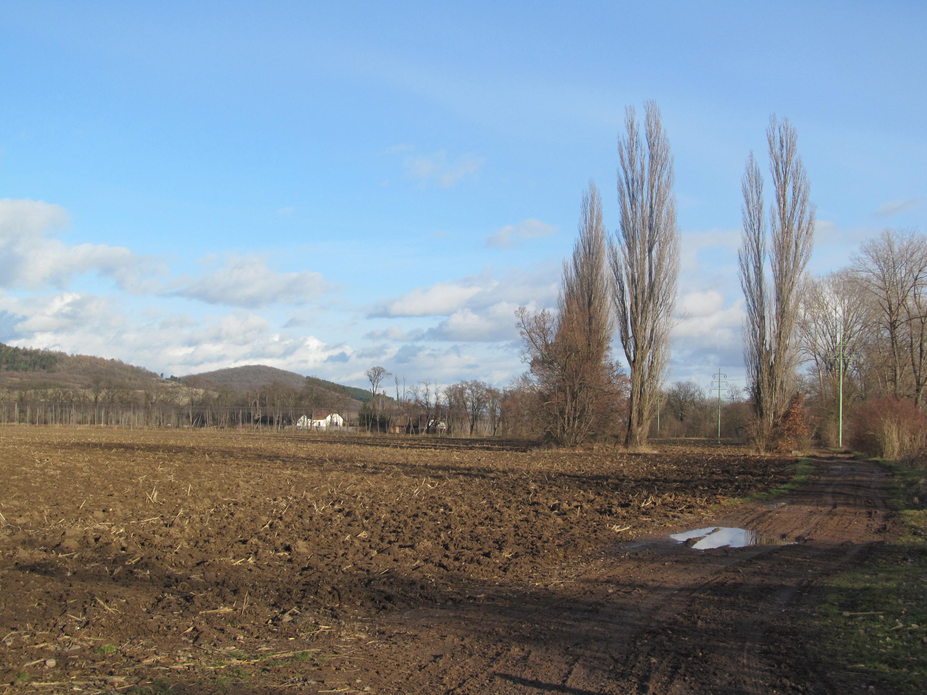 Pohled na samotu Lužerady